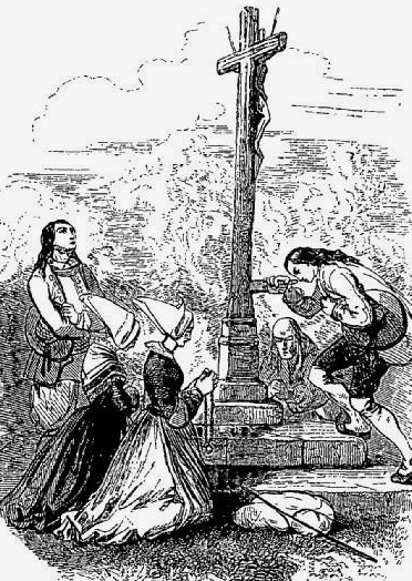 Saint-Jean-du-Doigt (dessin de 1844, publié dans "La Bretagne" de Jules Janin